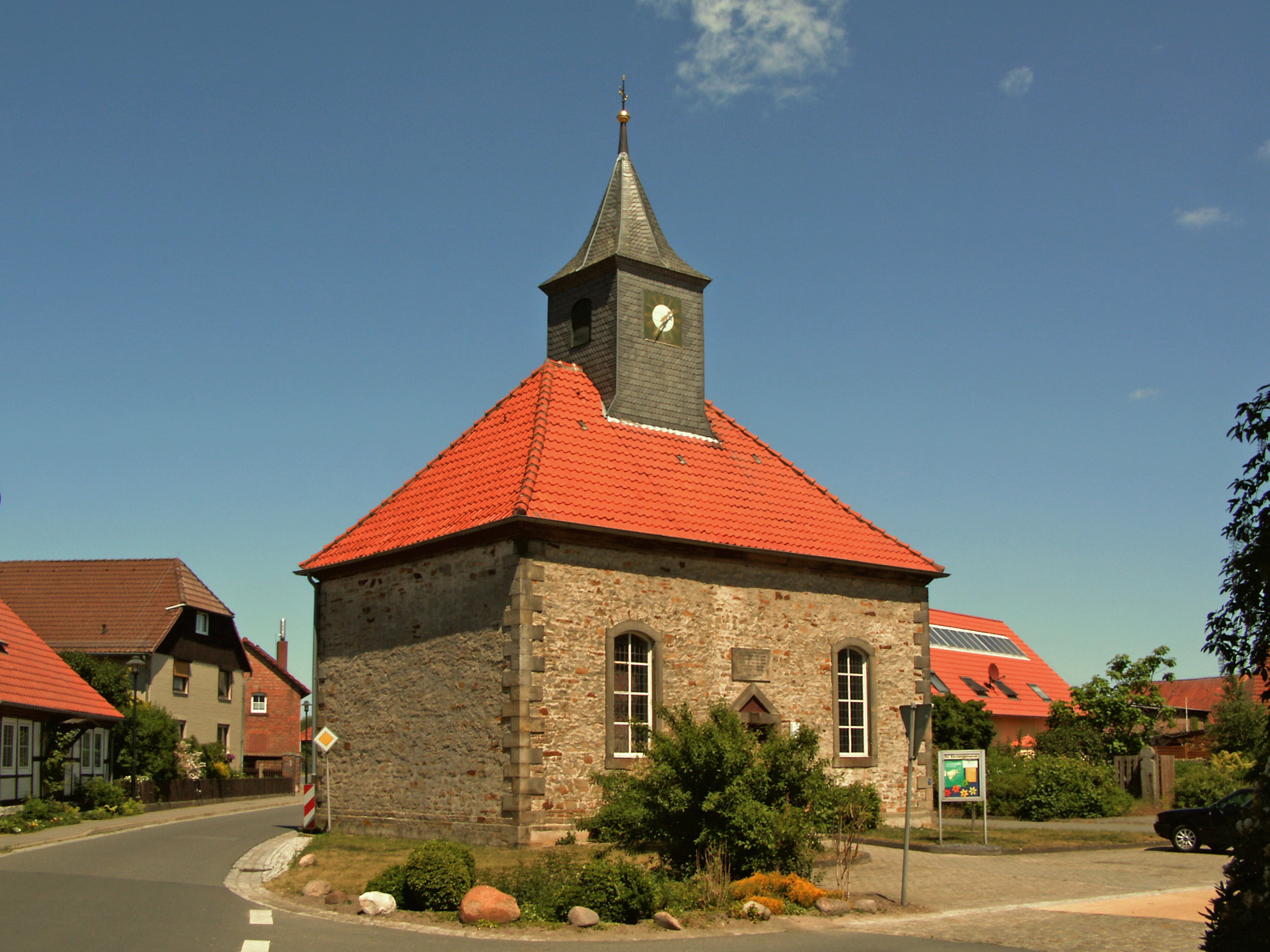 Evangelische Kirche St. Laurentius in Meinkot, Ortsteil von Velpke.